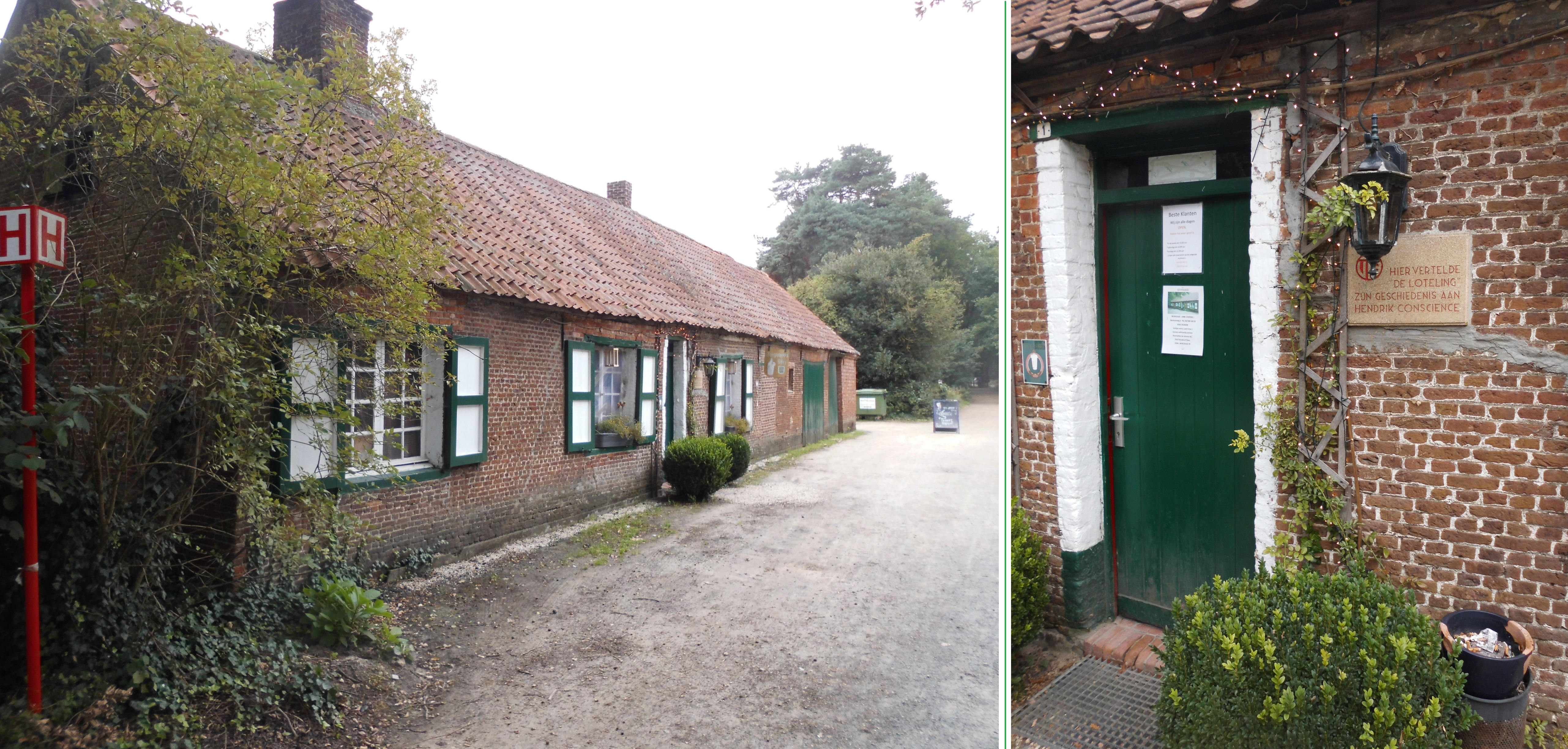 Boshuisje - Boshuisweg - Zoersel - Provincie Antwerpen - België